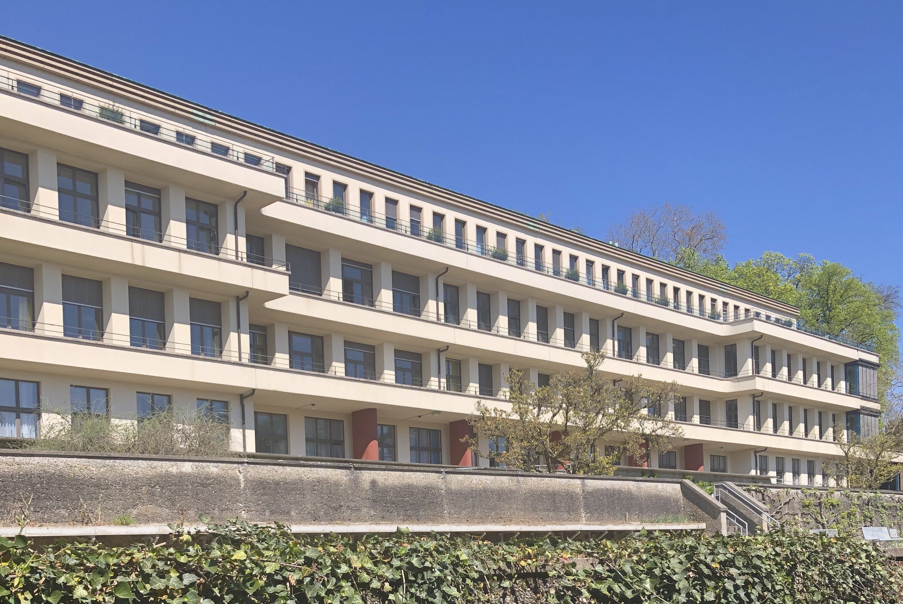 Inselspital Lory-Spital